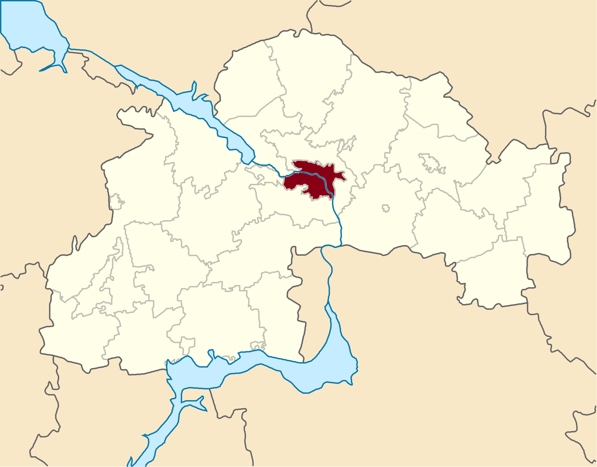 Dnipropetrovsk-Raion map